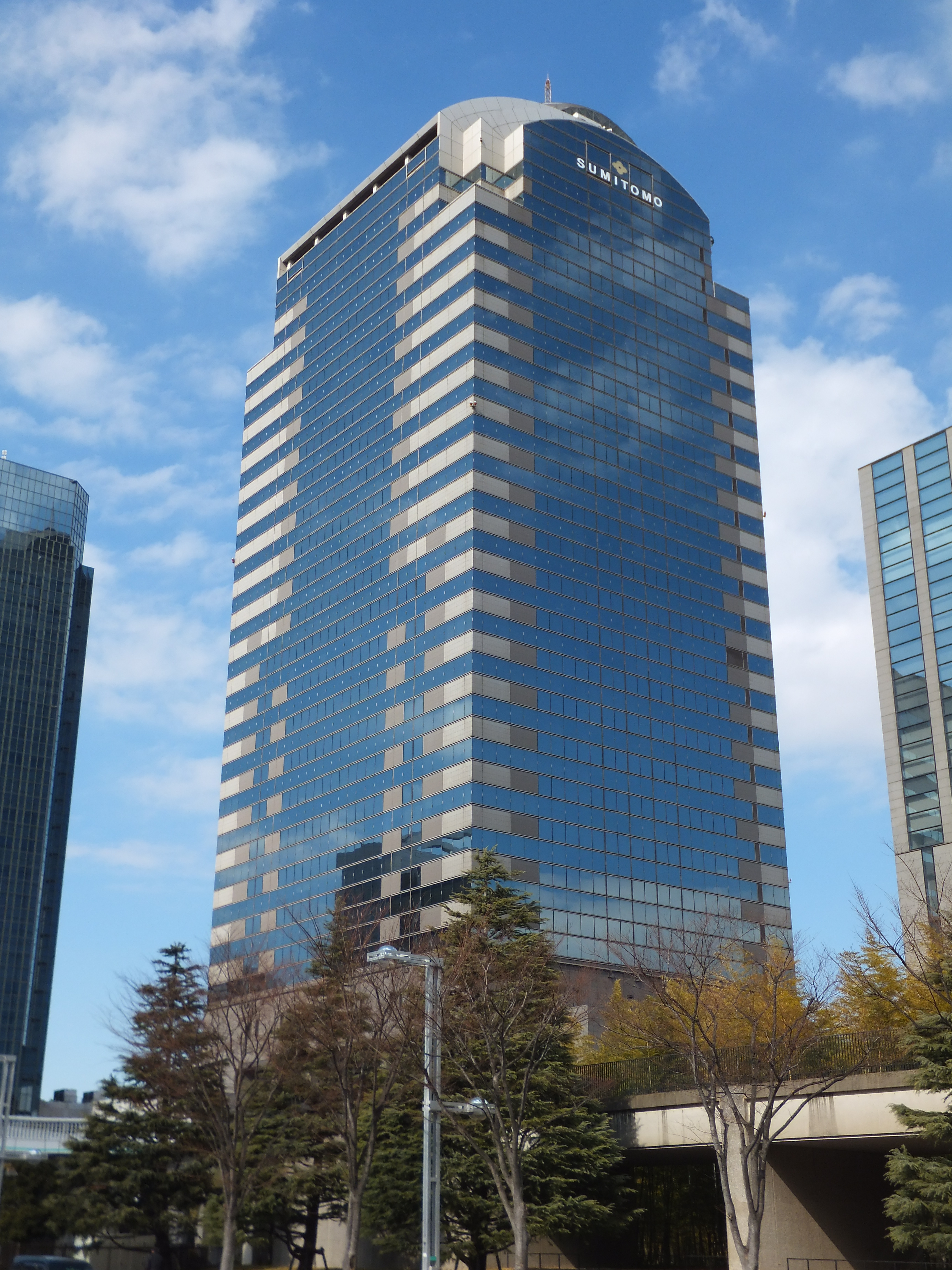 住友ケミカルエンジニアリングセンタービル